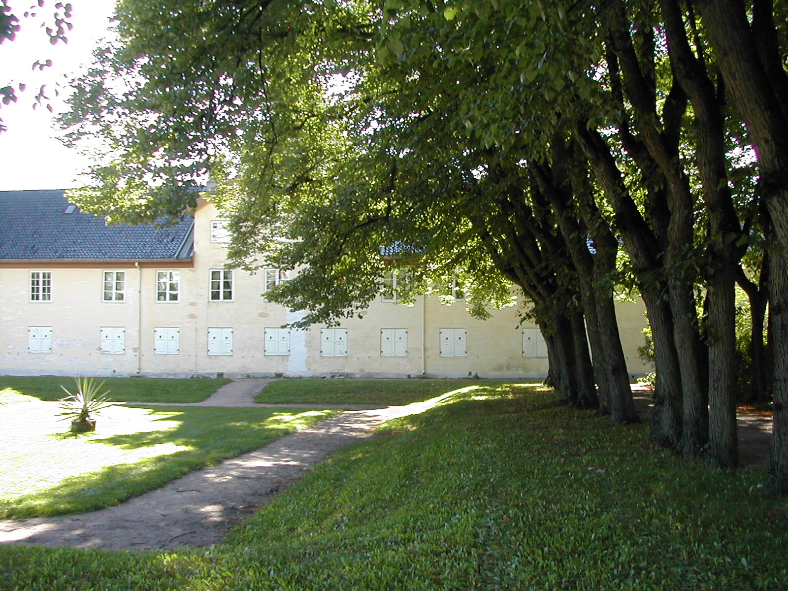 Frogner Hovedgård, Frogner, Oslo